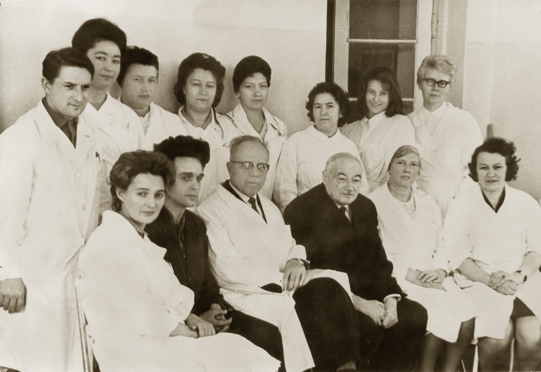 Сотрудники кафедры пропедевтики детских болезней ЛПМИ во главе с проф. А. Б. Воловиком